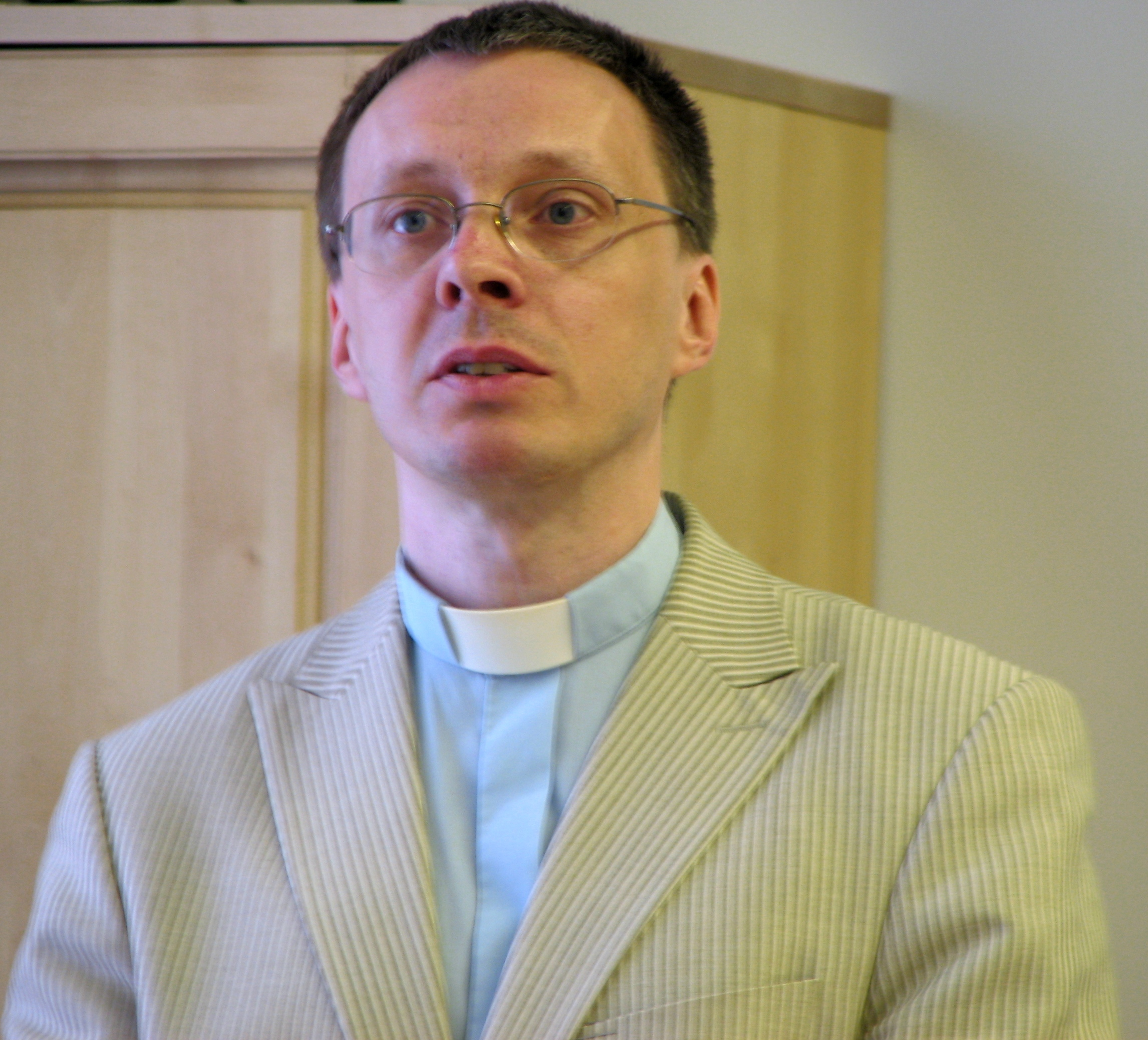 Jaan Lahe on eesti teoloog